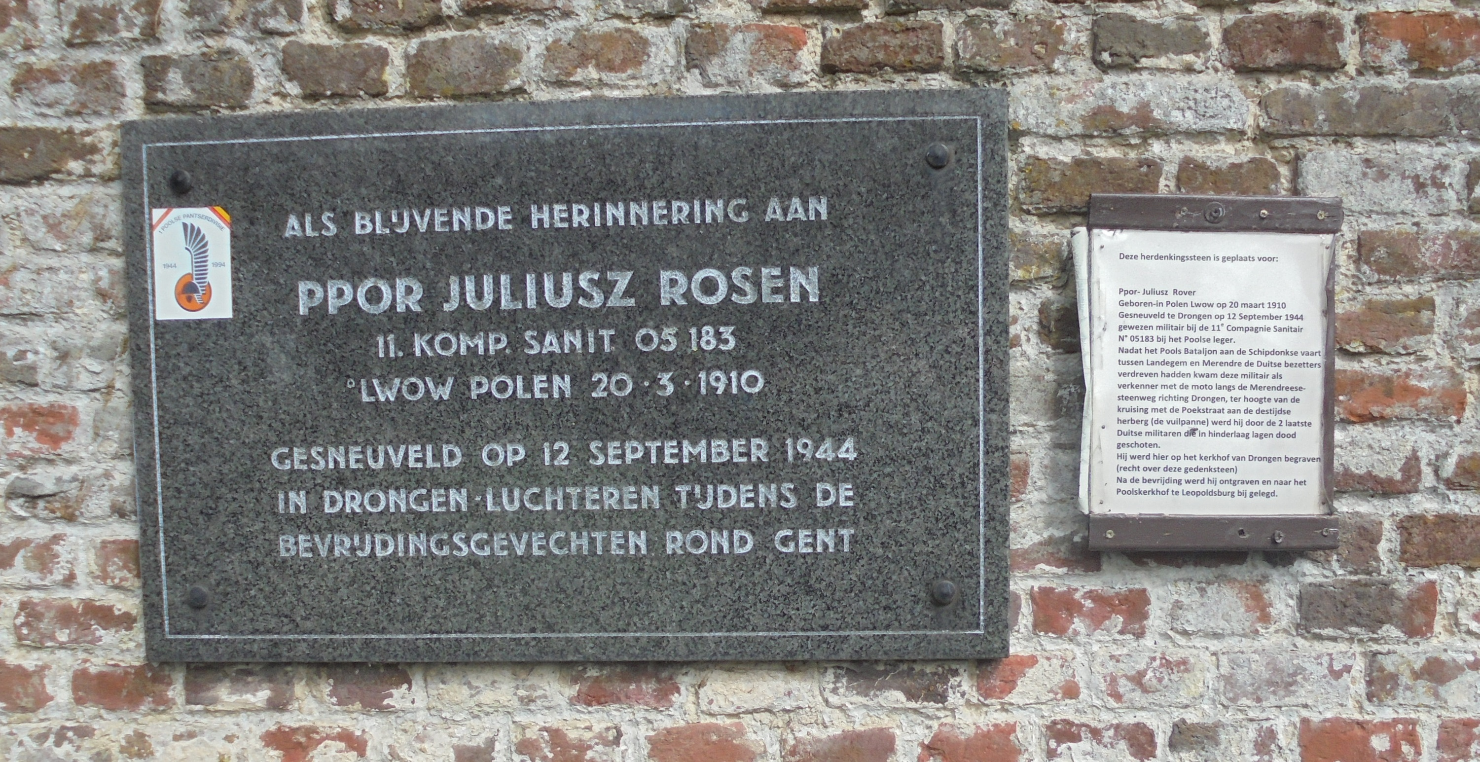 Gedenksteen Pools soldaat Ppor Juliusz Rosen (1910-1944) - hoek Antoon Catriestraat met de Oude Abdijstraat - Drongen - Gent - Oost-Vlaanderen - België